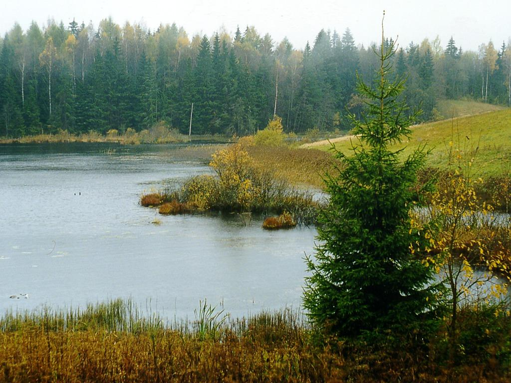 Sirds ezers 1998-10-17